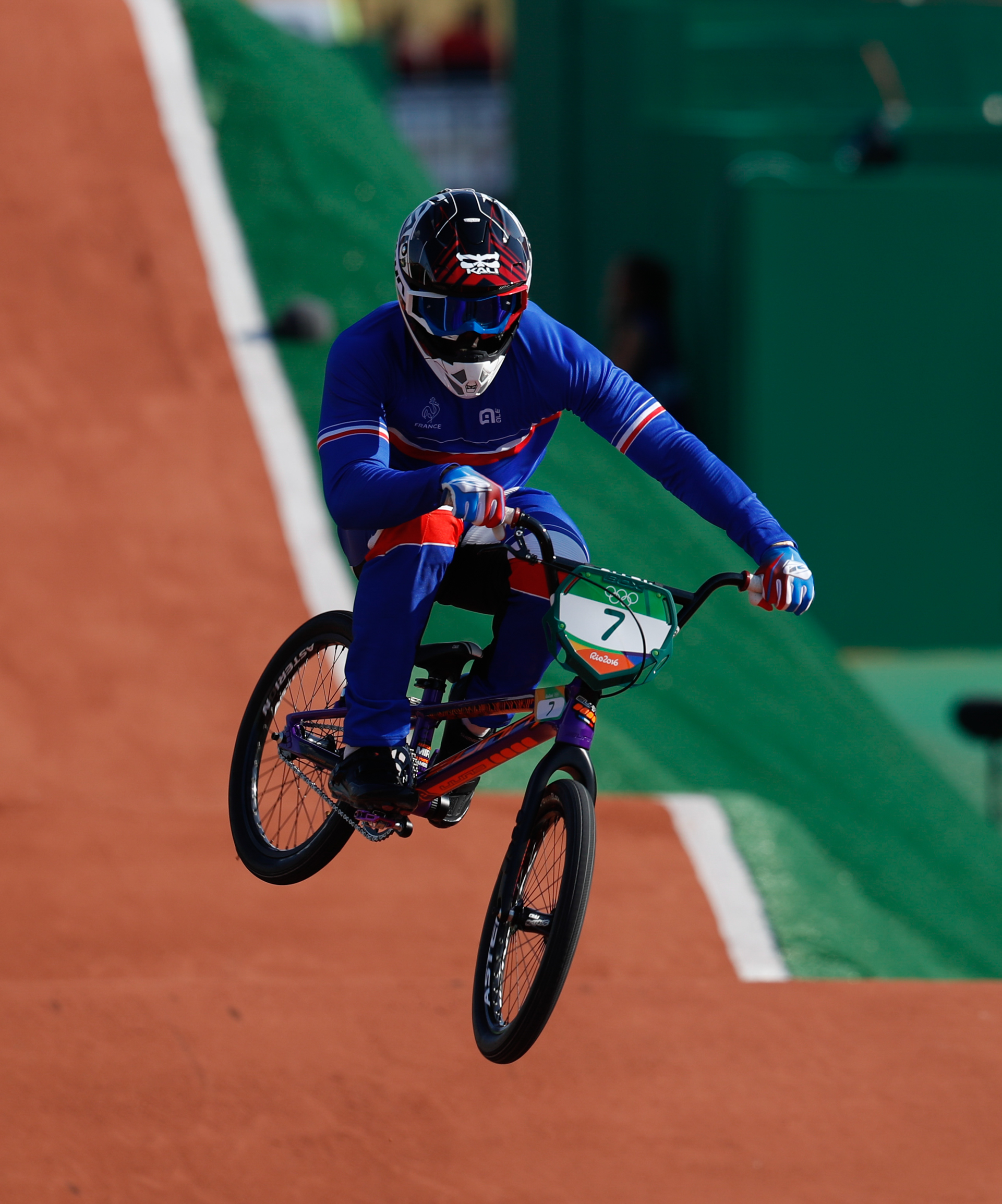 Rio de Janeiro - Ciclista francês Amidou Mir compete BMX nos Jogos Olímpicos Rio 2016, no Parque Radical em Deodoro (Fernando Frazão/Agência Brasil)